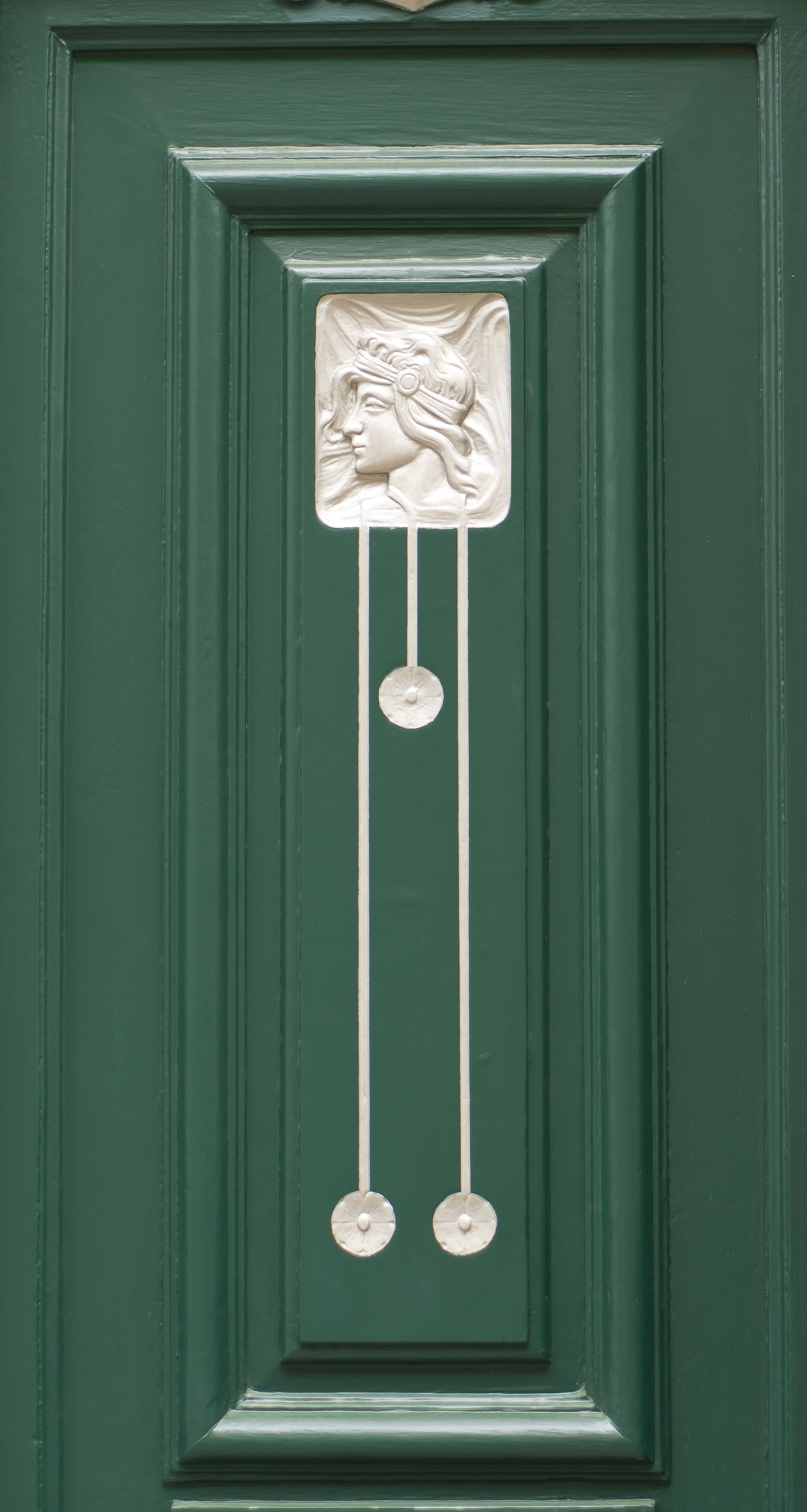 Detalle de uno de los cuarterones de la puerta de la Casa de Salomón Cohen